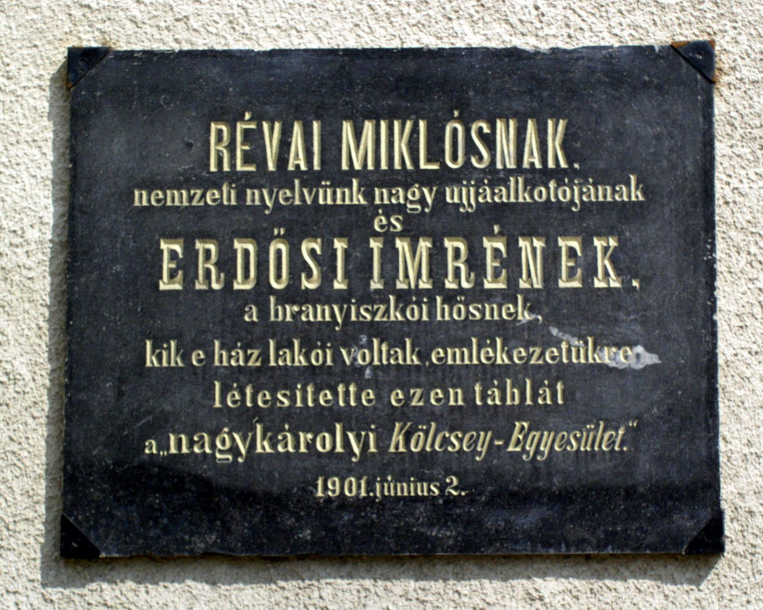 Révai Miklós és Erdősi Imre piaristák emléktáblája a nagykárolyi piarista rendház homlokzatán, amelyet a román uralom évei alatt a plébánián őriztek. 2004-ben helyezték el ismét az épület homlokzatán.